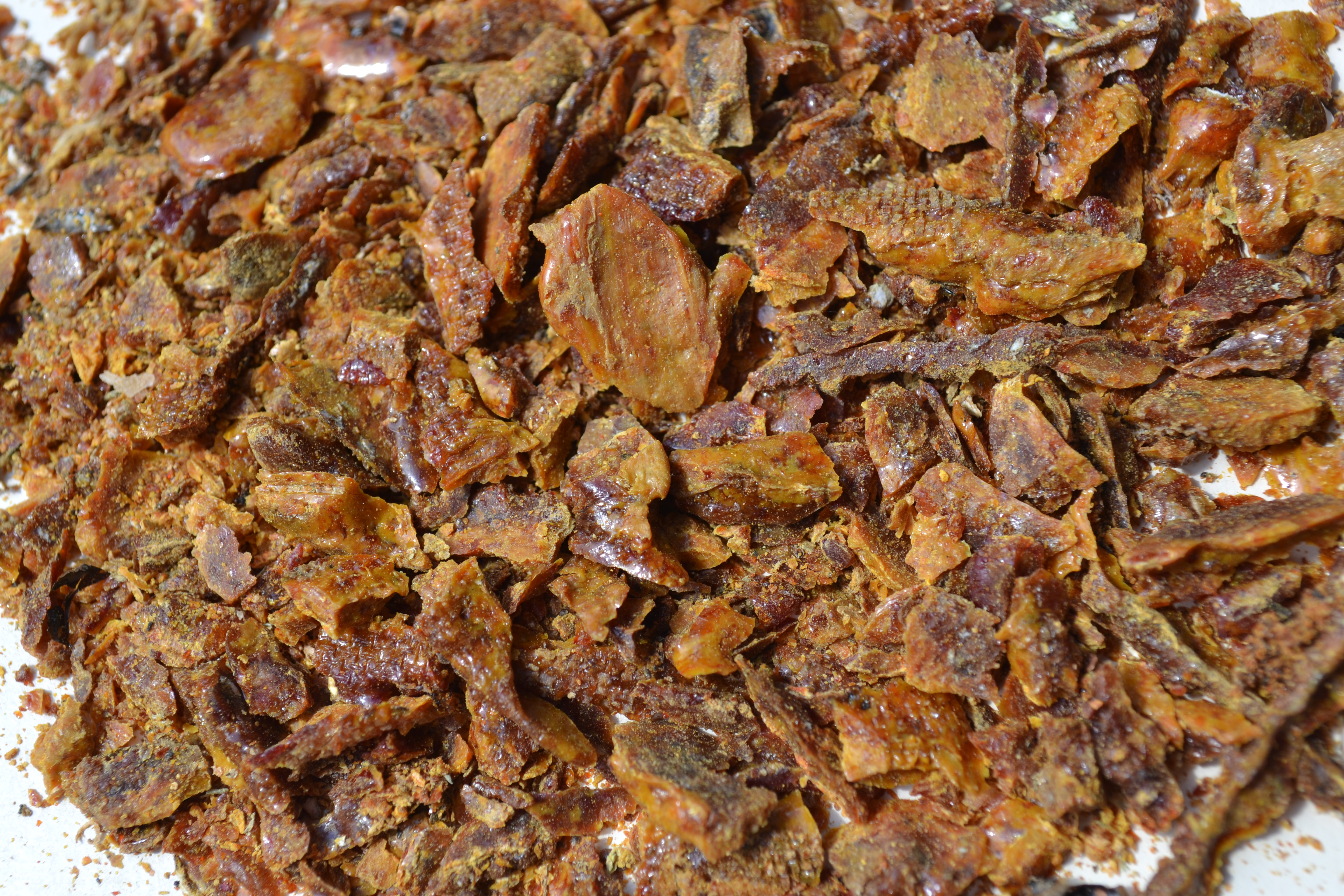 Propolisstücken